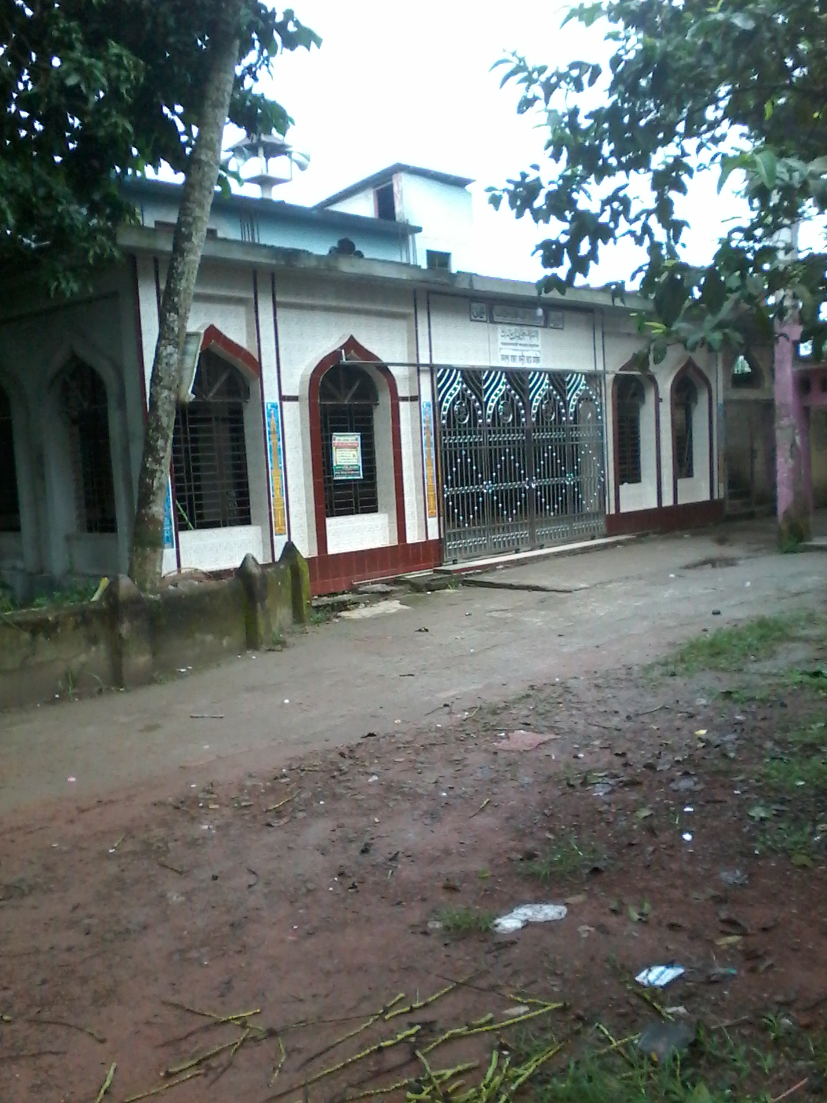 বদরপুর বাজার কেন্দ্রীয় জামে মসজিদ